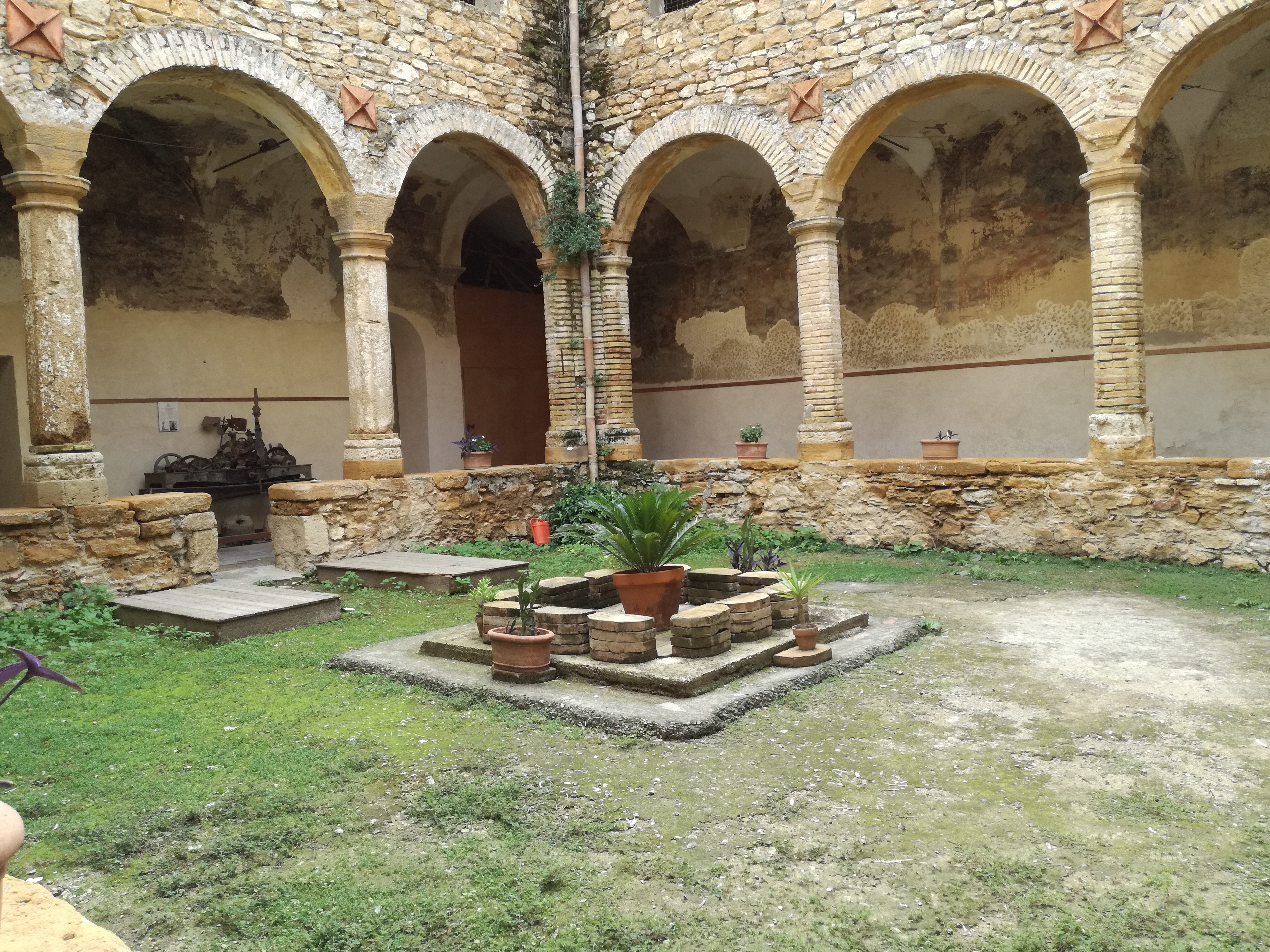 Chiostro Santa Maria di Gesù This is a photo of a monument which is part of cultural heritage of Italy.